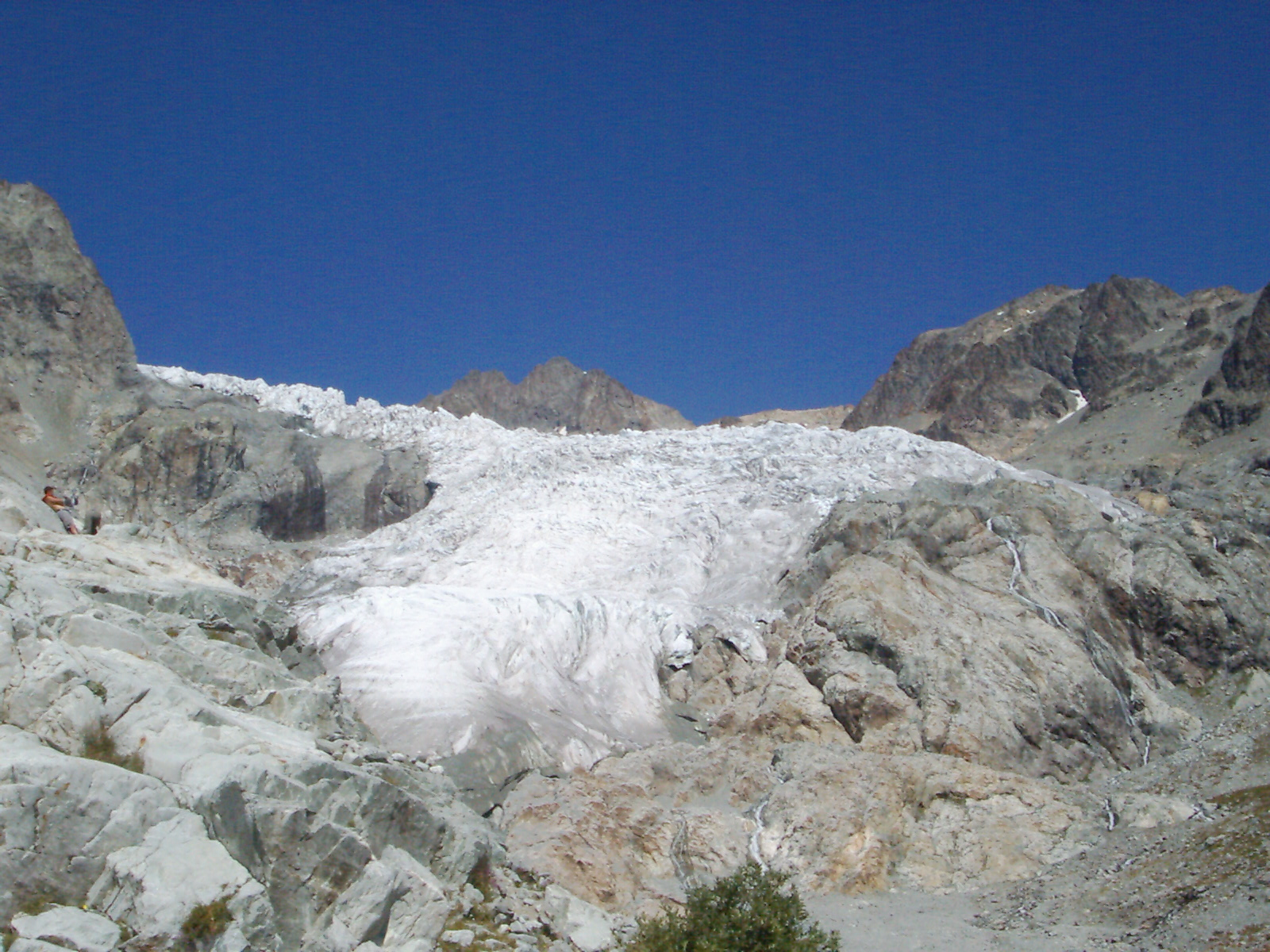 Parc des Ecrins - Le glacier Blanc par